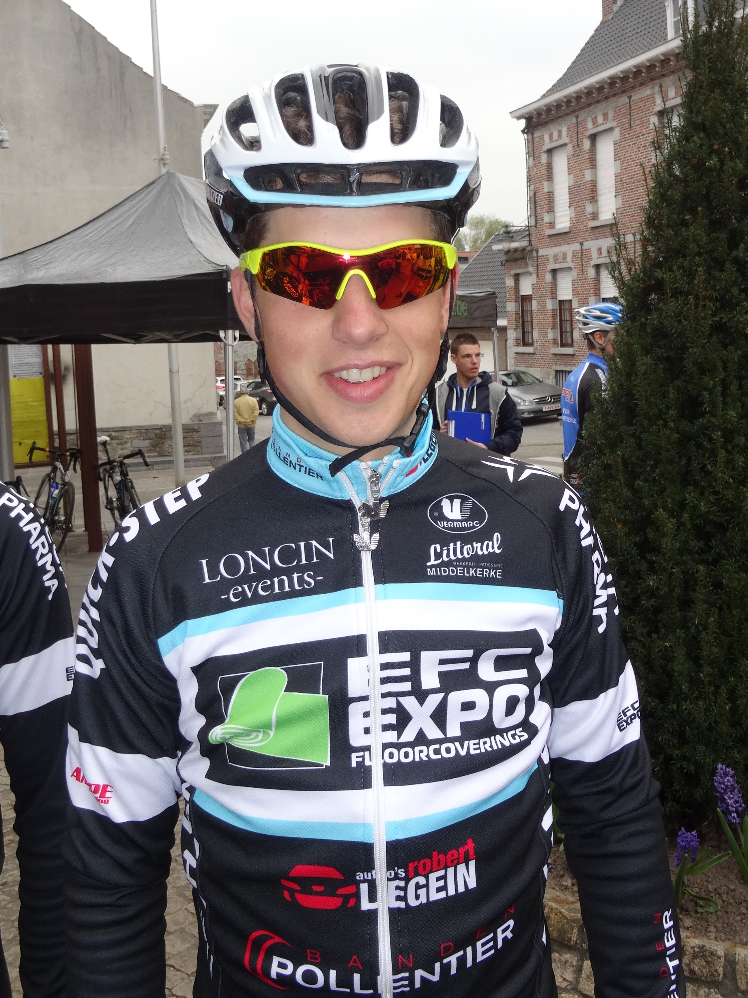 Triptyque des Monts et Châteaux 2014, étape 1, 4 avril 2014, départ d'Antoing. Depicted person: Jens Wallays Depicted team: EFC-Omega Pharma-Quick Step The creation of these files was made possible thanks to the organizers of the Triptyque des Monts et Châteaux 2014 English | français | +/−